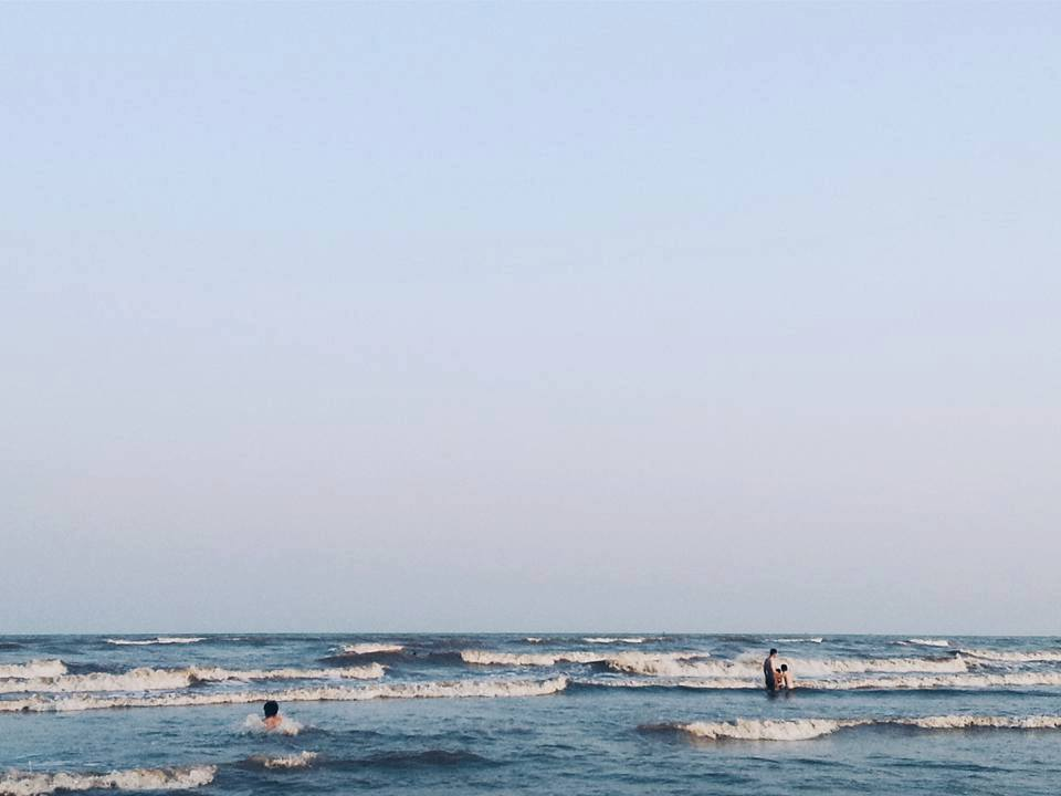 Du khách tắm biển ở cồn Nổi Kim Sơn, Ninh Bình